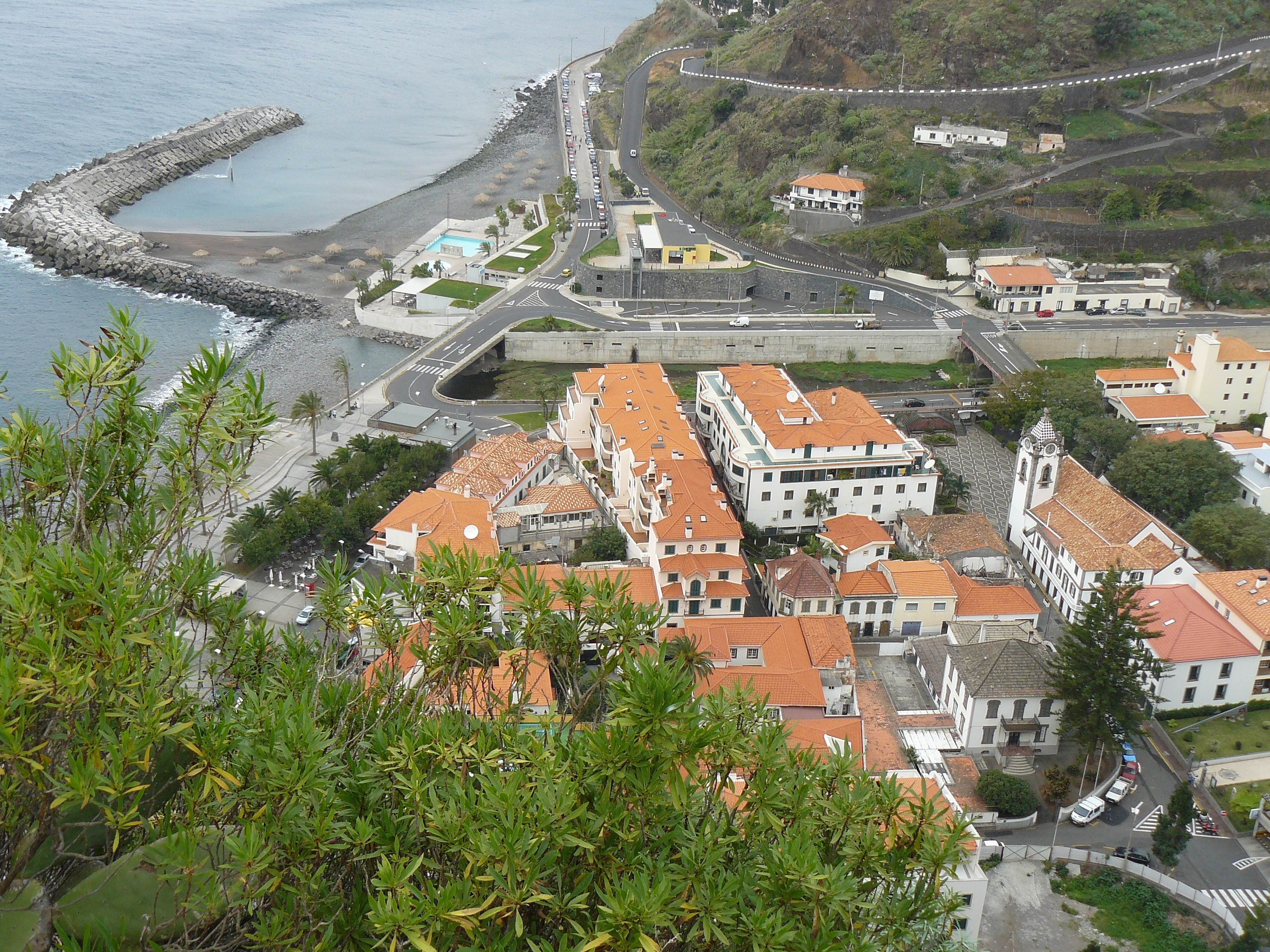 Vue de Ribeira Brava (Madère, Portugal)